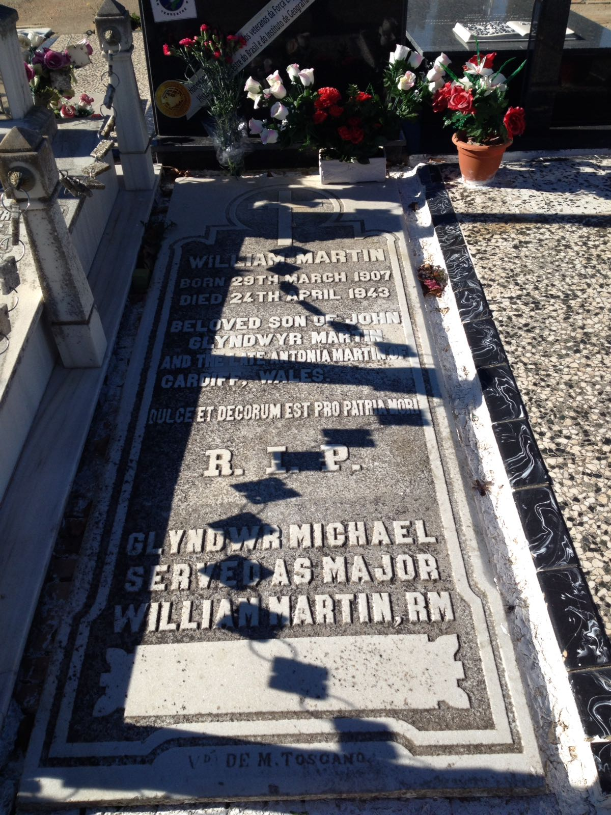 Imagen actual (2017) de la tumba de William Martin